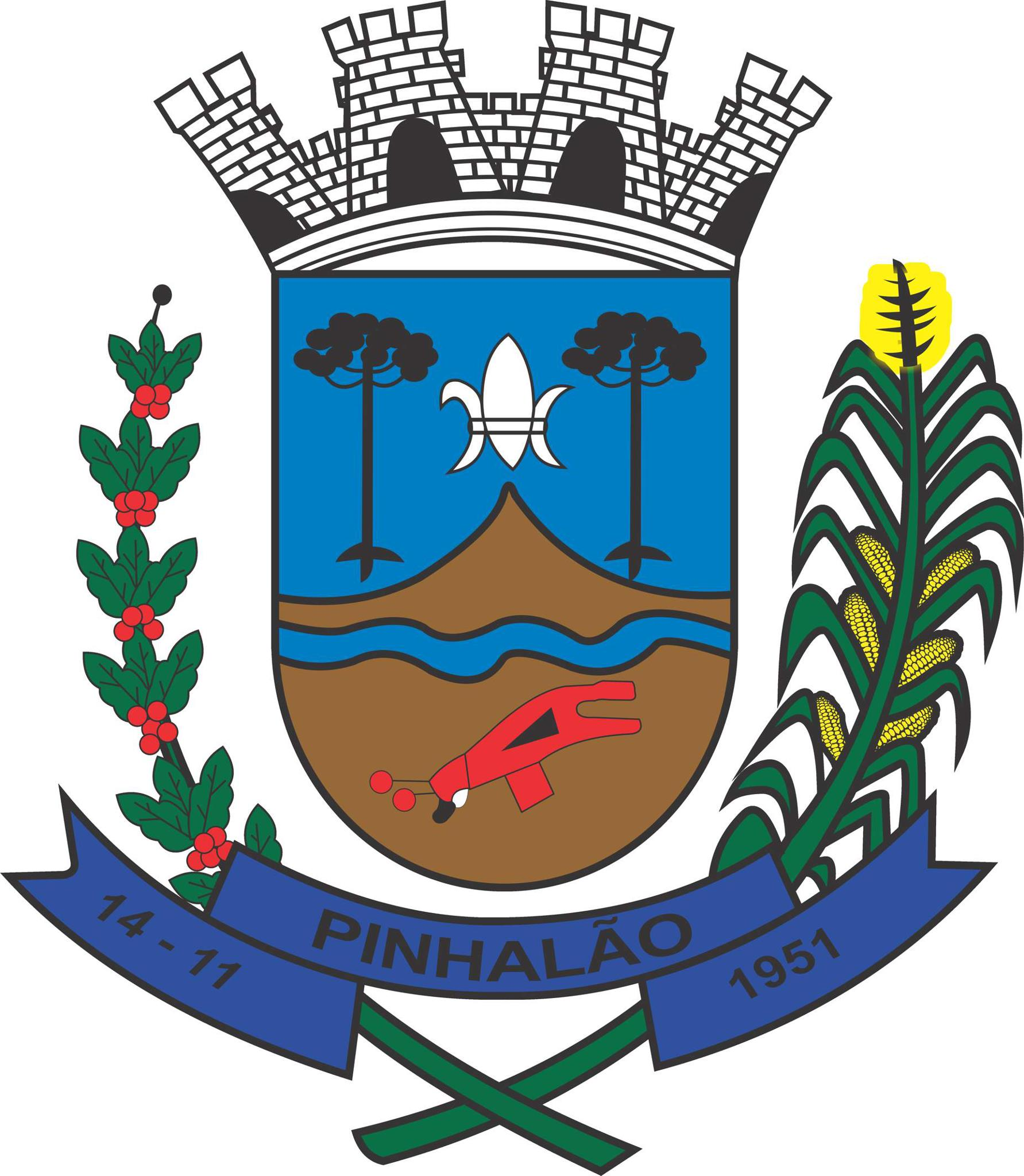 Brasão de Pinhalão